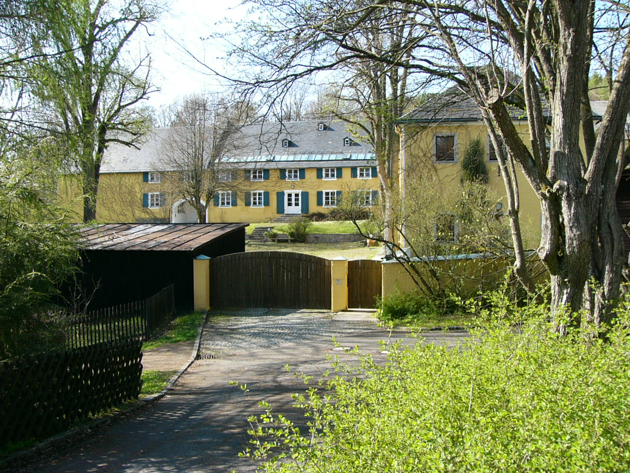 Ansicht des Rittergutes Bug 2010